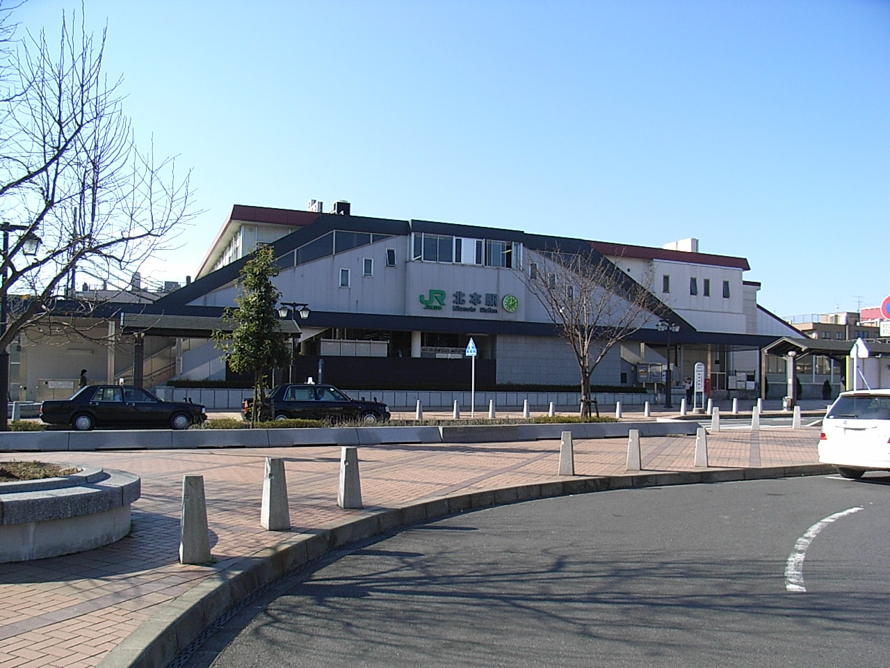 Kitamoto Station (East Entrance) on JR Takasaki Line. (1-12,Kitamoto,Kitamoto-shi,Saitama-ken,JAPAN)